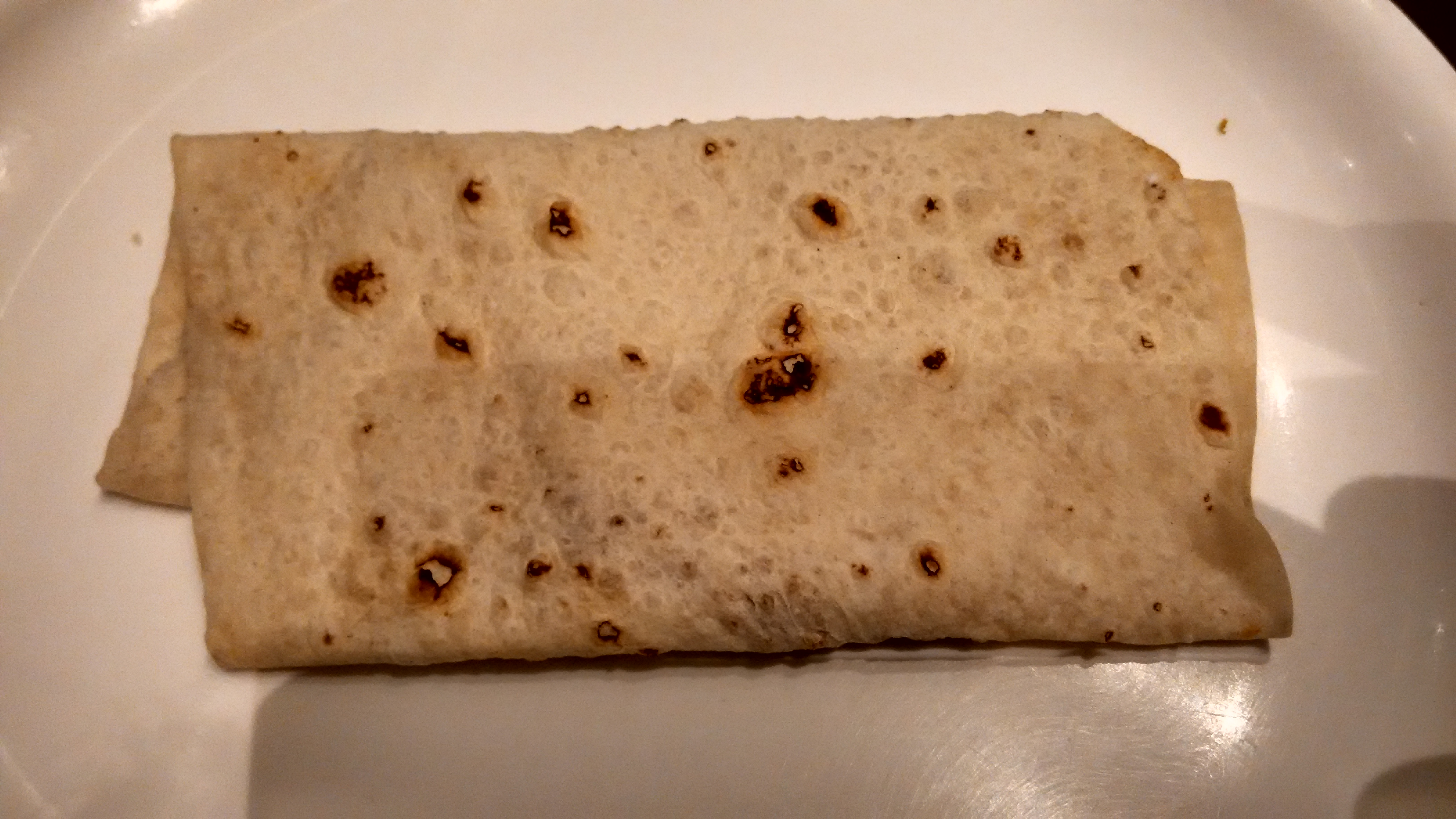 ருமானி உரொட்டி